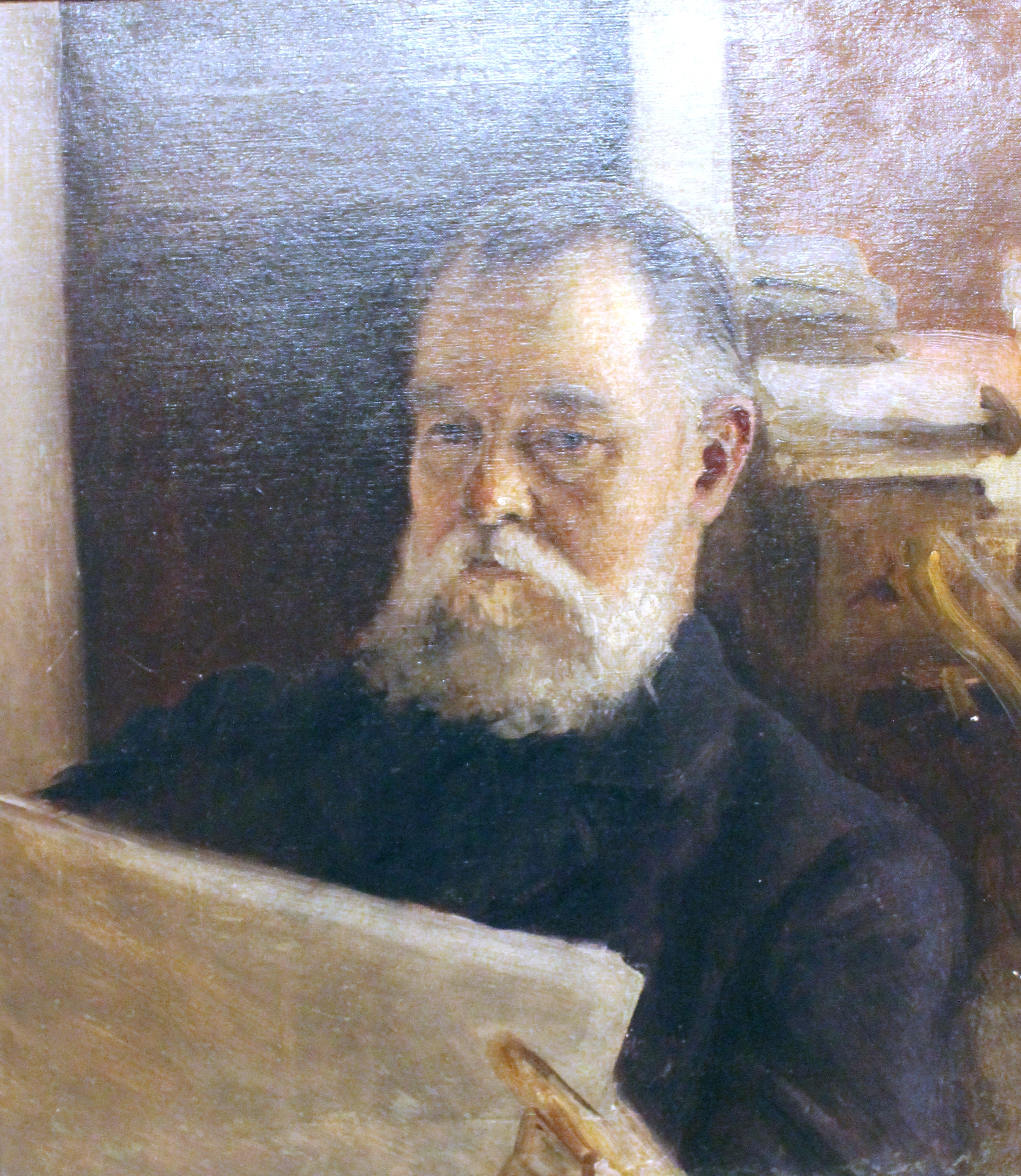 Петр_Иванович_Юргенсон._Портрет_кисти_А.П.Юргенсон